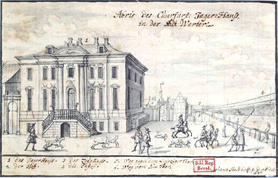 Das kurfürstliche Jägerhaus im Jahr 1690. Nach Plänen von Johann Arnold Nering ließ Kurfürst Friedrich III. um 1690 einen neuen Jägerhof als Wohn- und Dienstsitz des Oberhofjägers bauen.